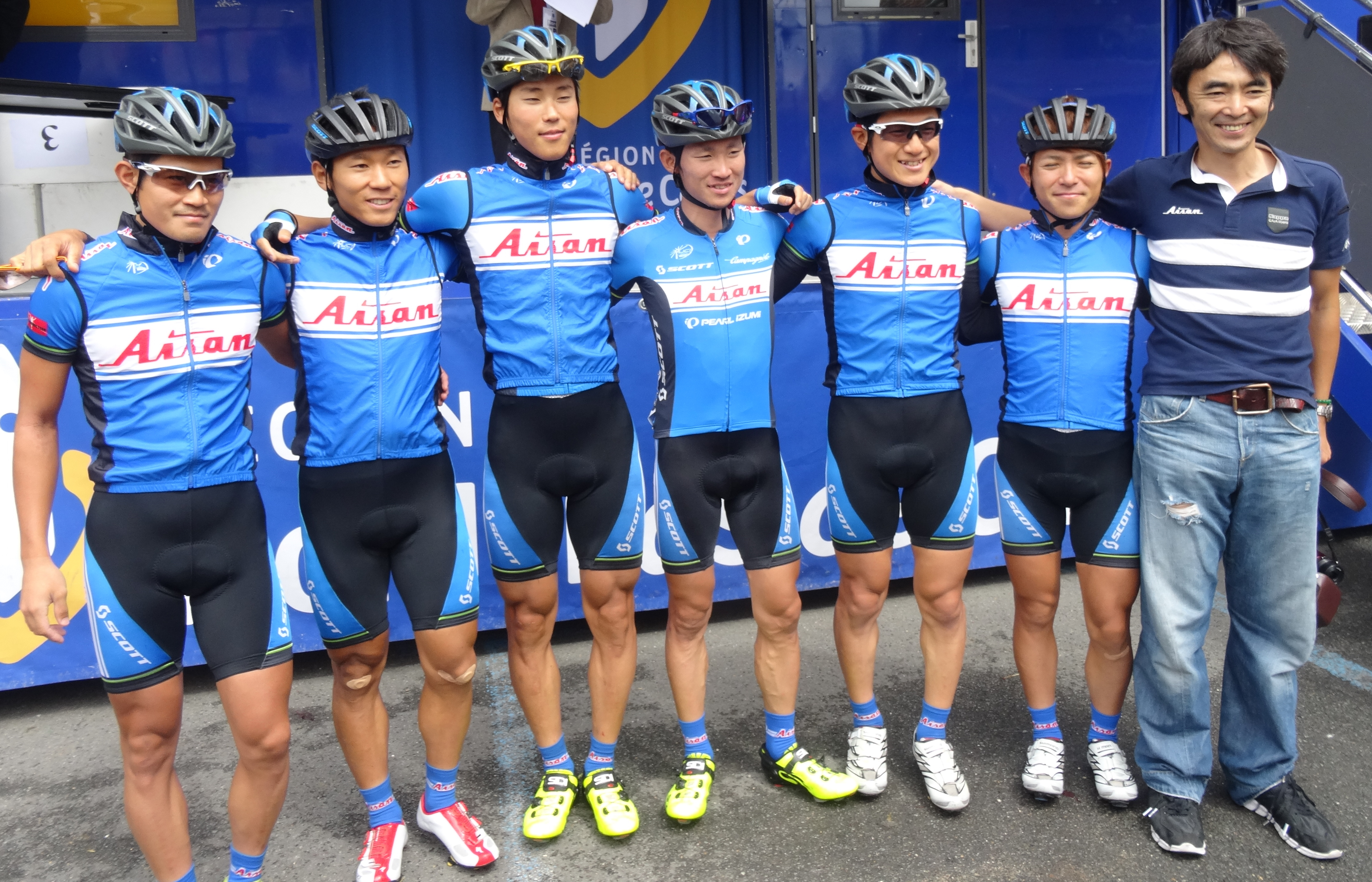 Reportage photographique réalisé le dimanche 13 juillet à l'occasion du départ et de l'arrivée de la Ronde pévéloise 2014 à Pont-à-Marcq, Nord-Pas-de-Calais, France.